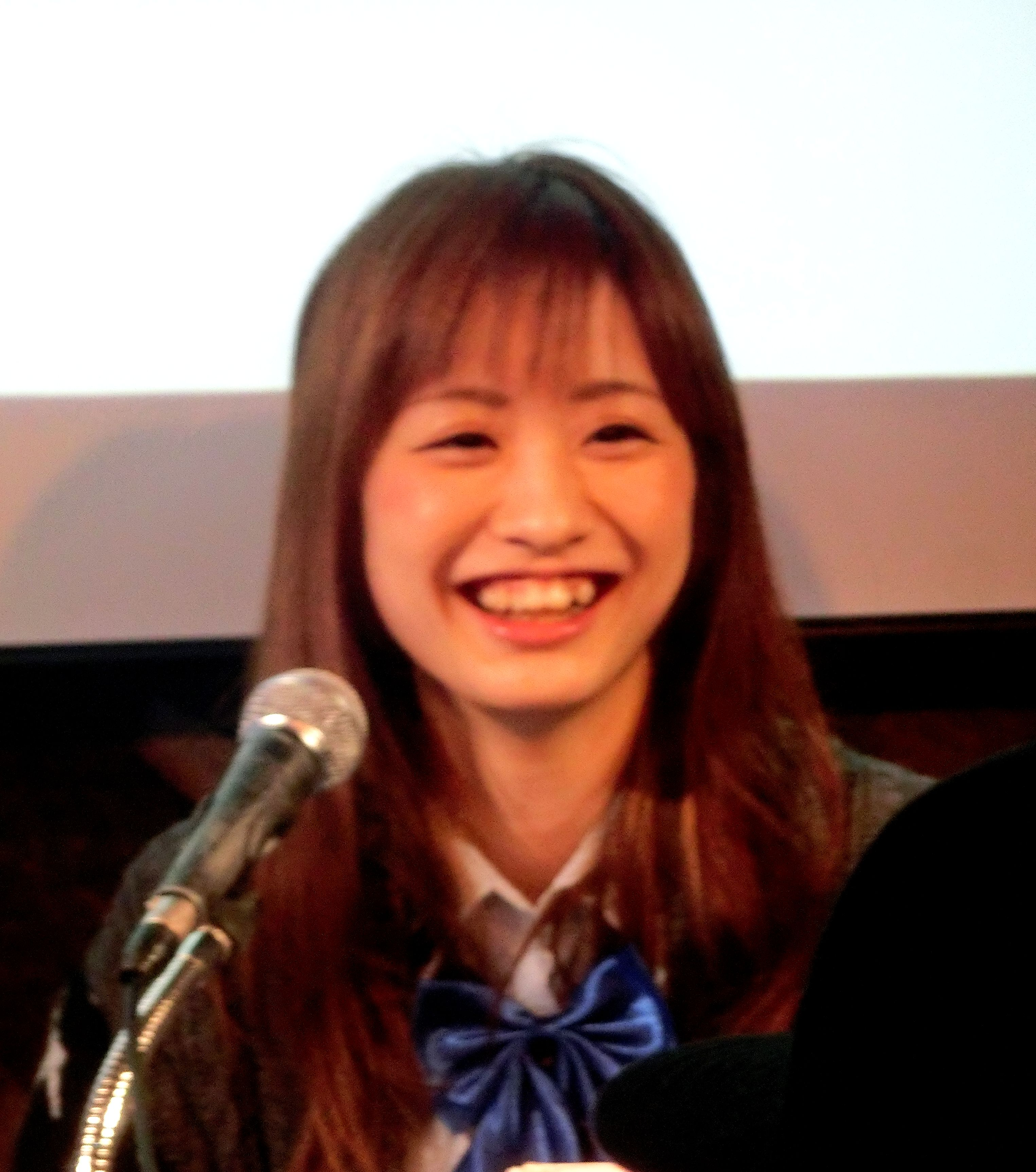 日乃まそら